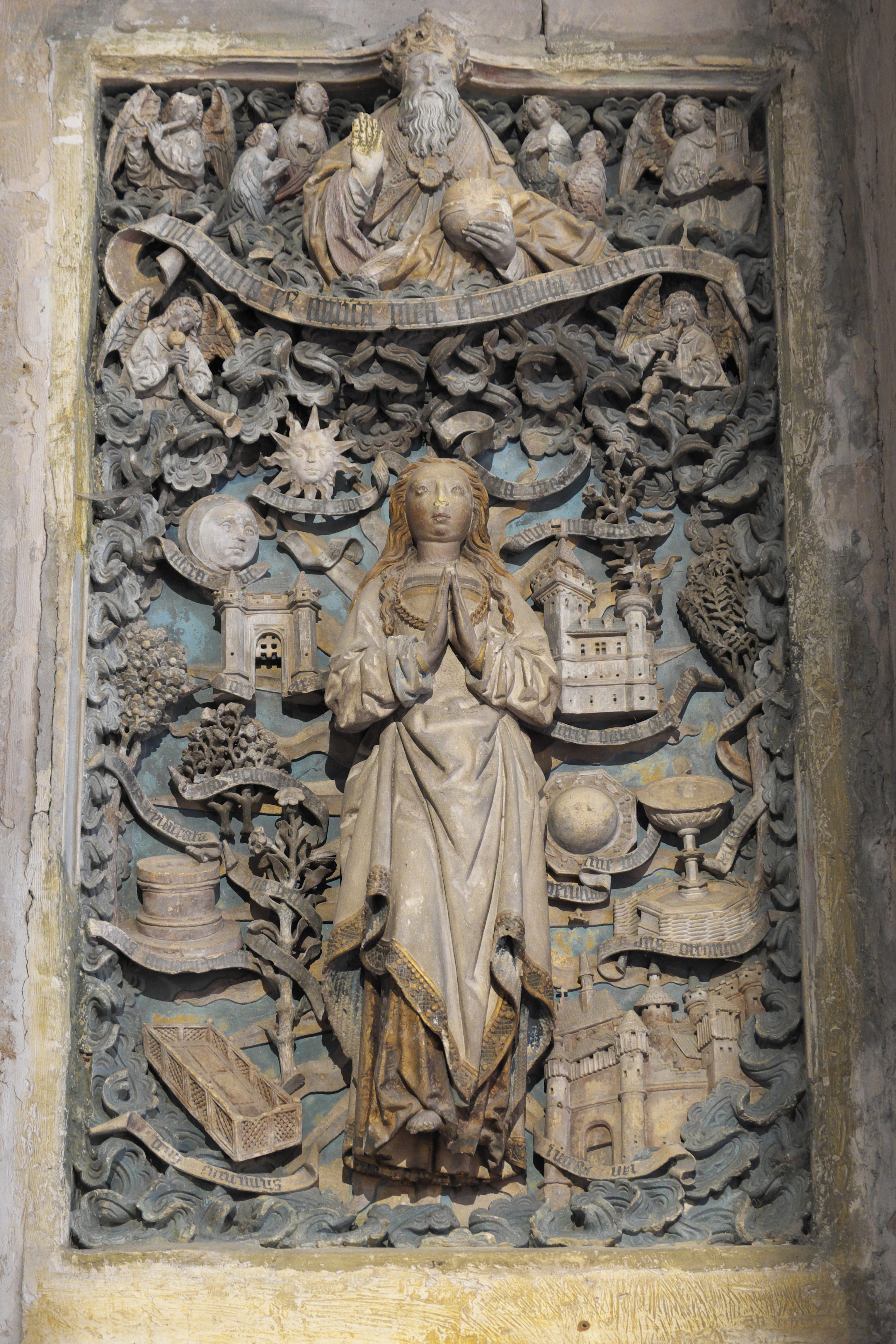 Katholische Pfarrkirche Notre-Dame in Bar-le-Duc im Département Meuse (Lothringen/Frankreich), Relief mit Mariensymbolen aus dem 16. Jahrhundert